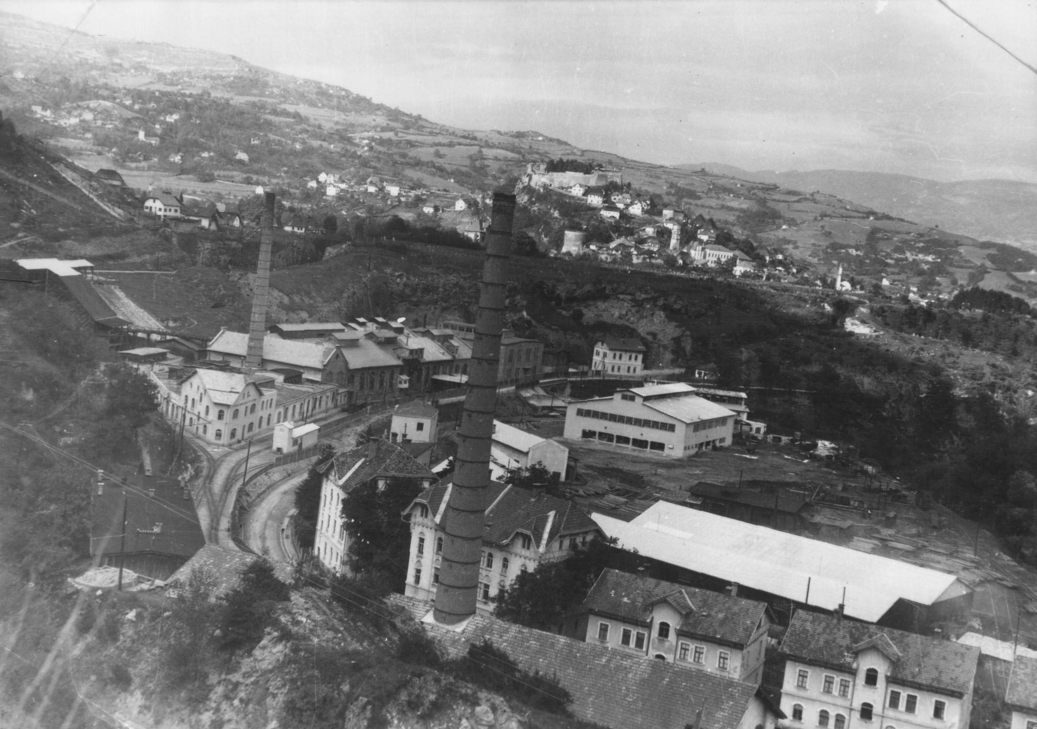 Srpskohrvatski / српскохрватски: Snimak Jajca, posle prvog oslobođenja grada, 29. septembra 1942. godine.